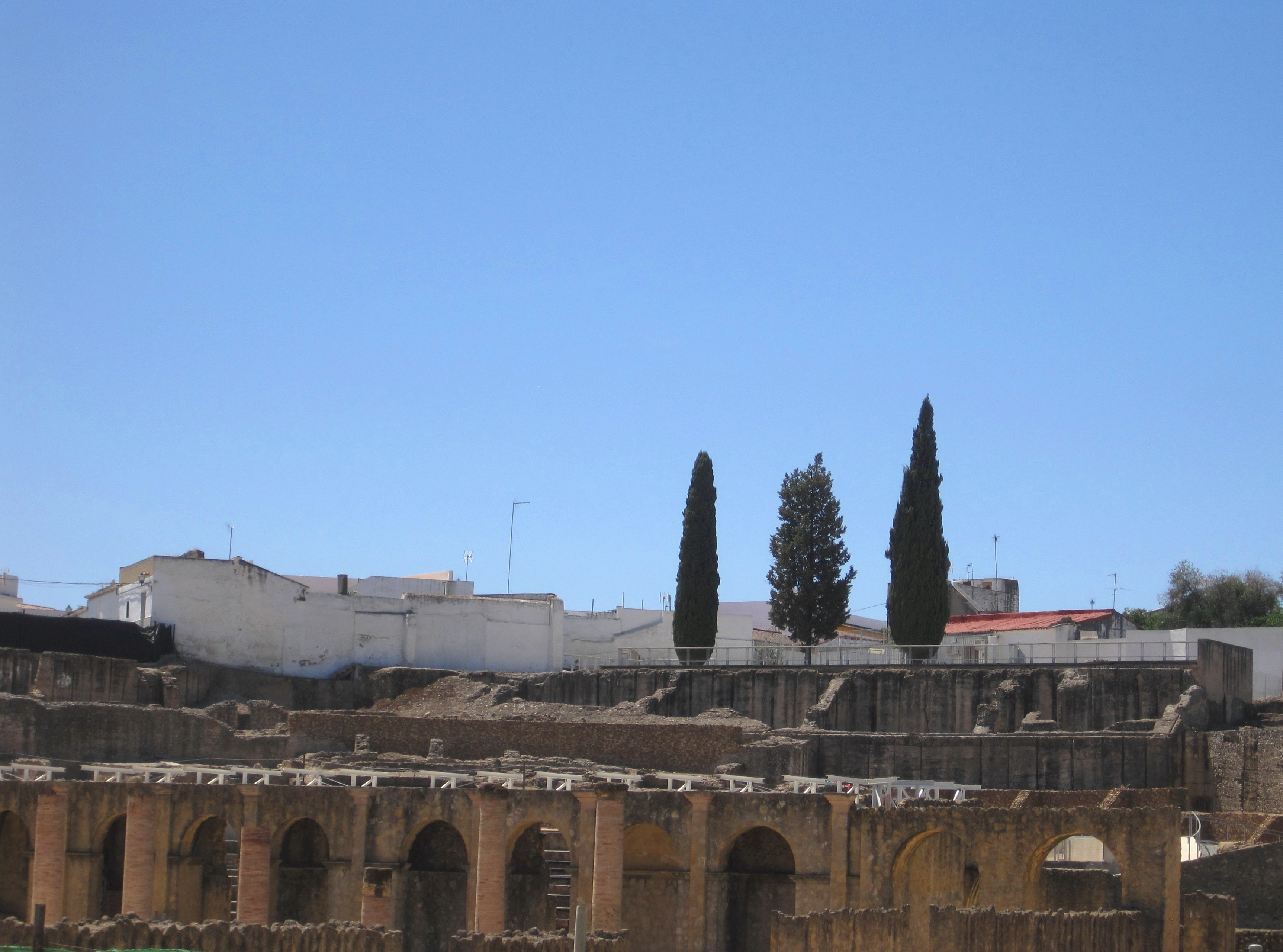 Sección 2.3 El teatro